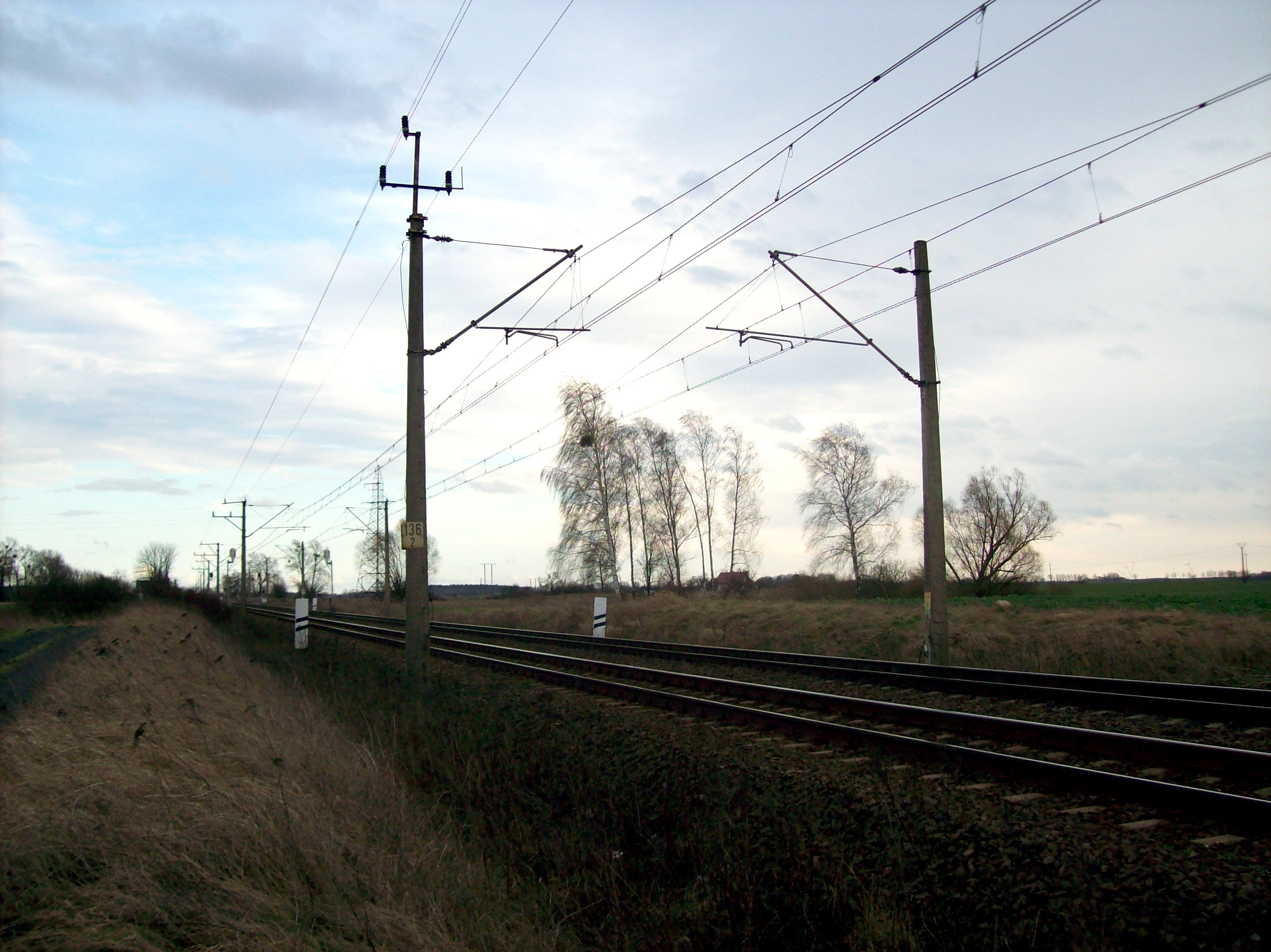 Linia kolejowa 351 odcinek Choszczno-Stary Kukom